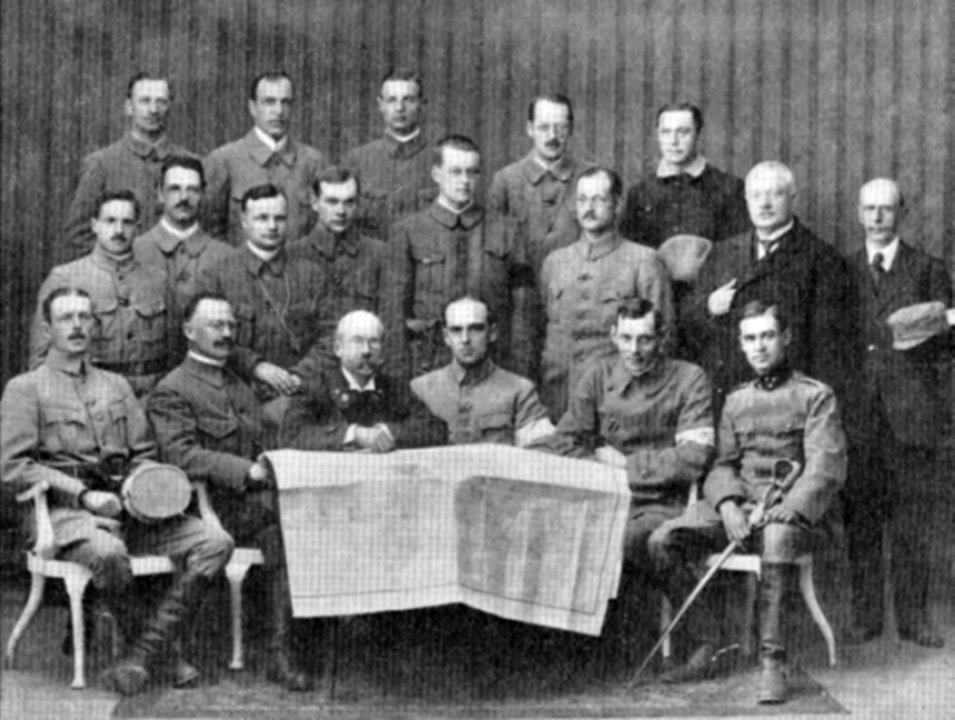 Description